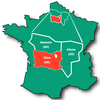 Position de l'oise dans la carte de France